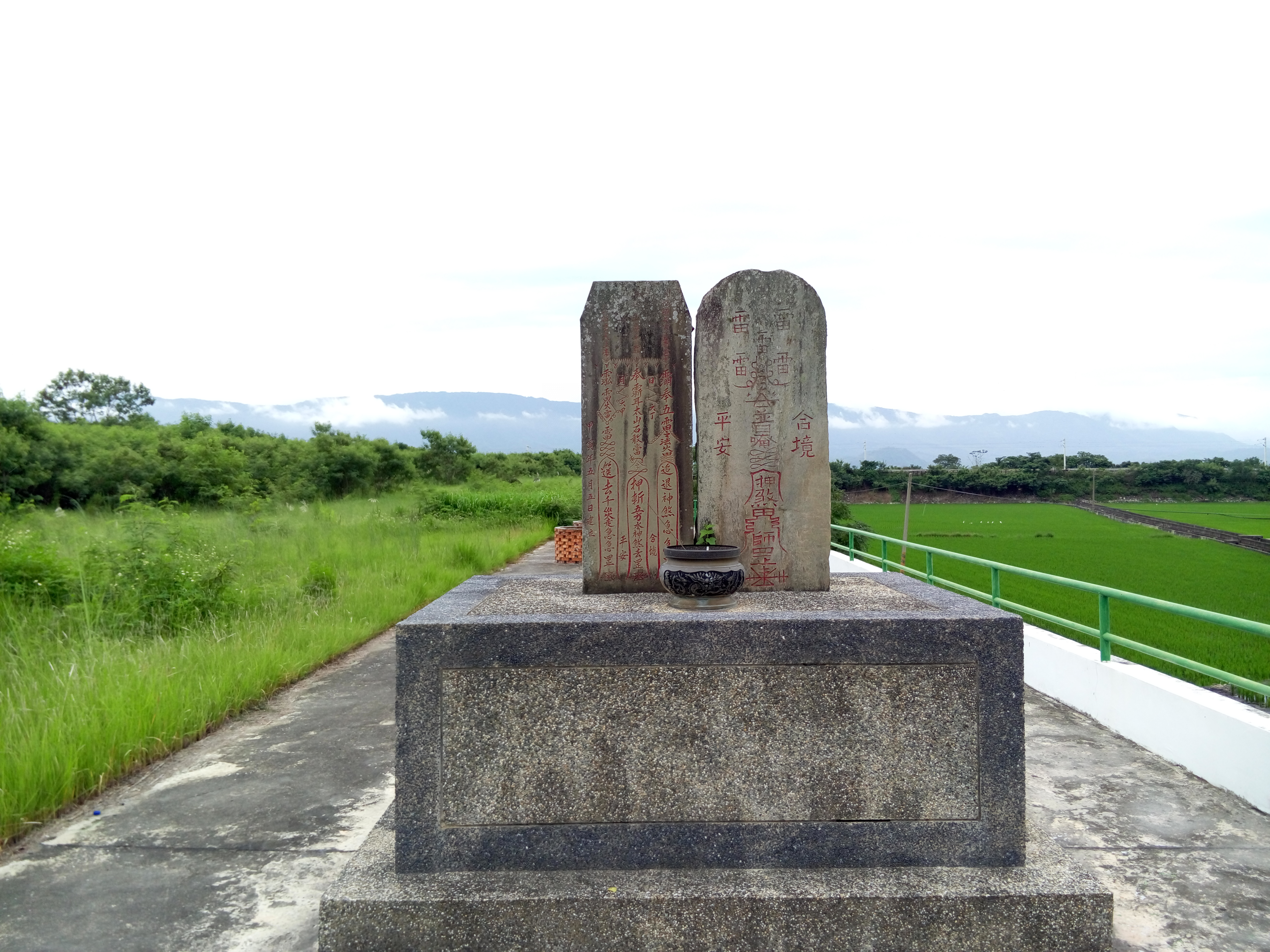 臺灣臺東縣關山鎮關山大圳五雷鎮水碑及泰山石敢當